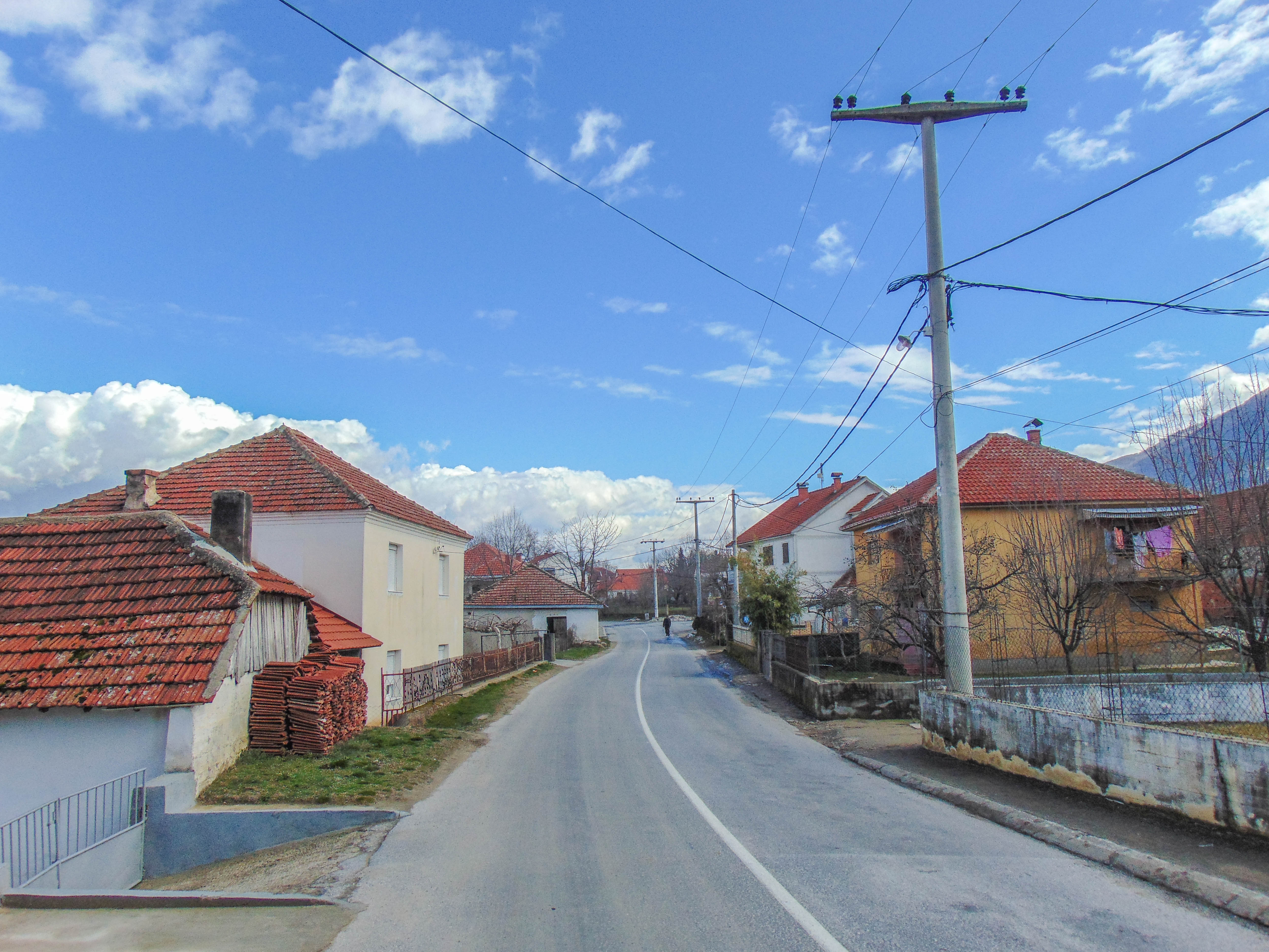 Колешино